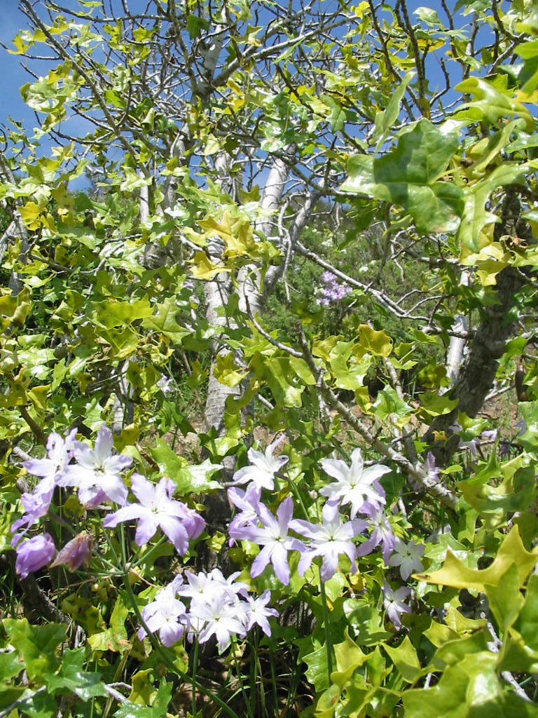 Carica chilensis, Los Vilos, Chile